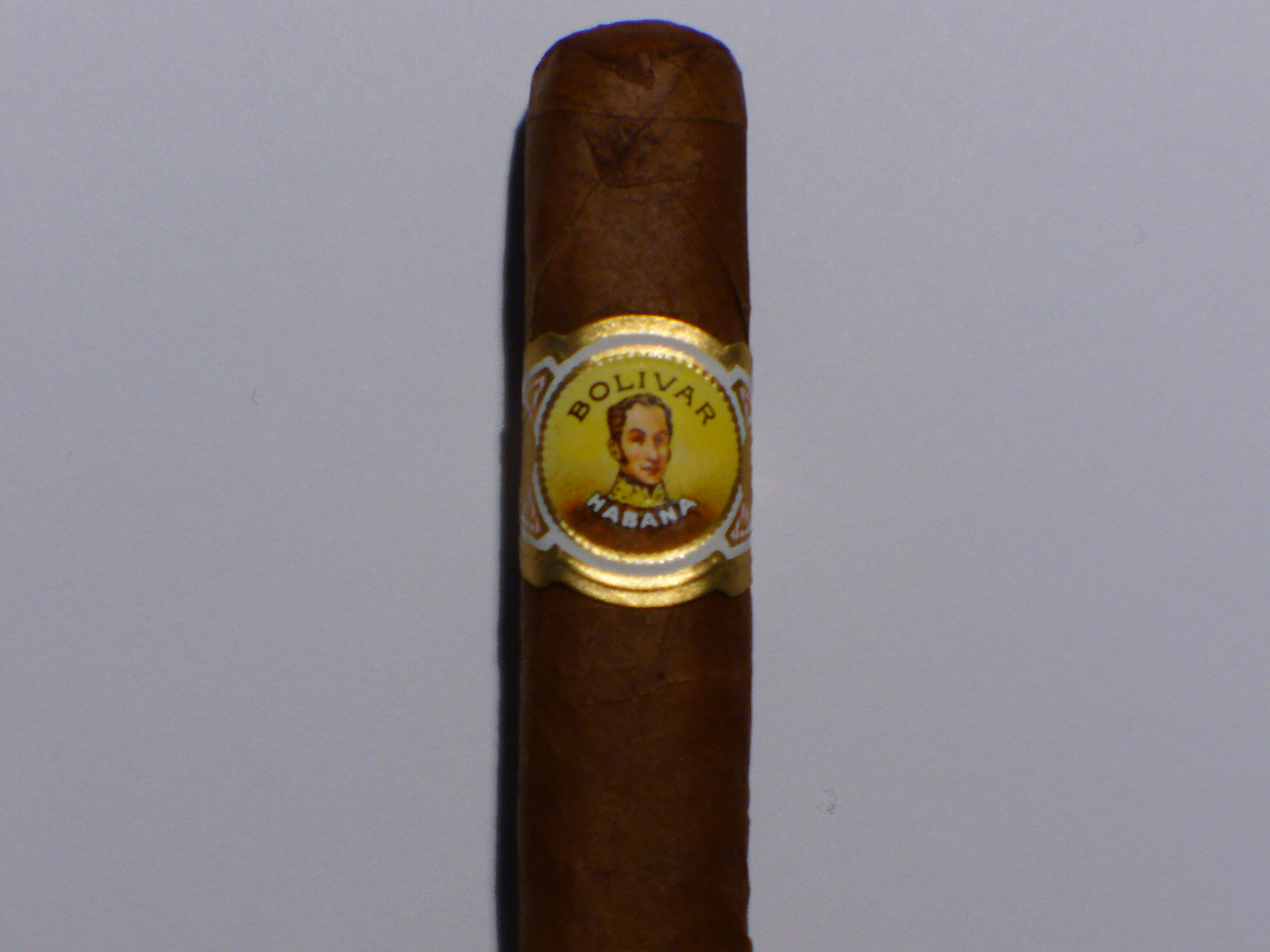 A Bolivar cigar.